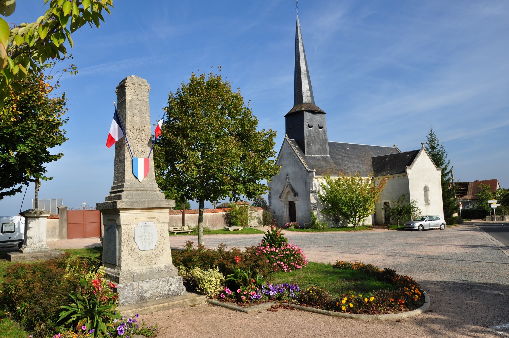 Baraize (Indre) - Place de l'église